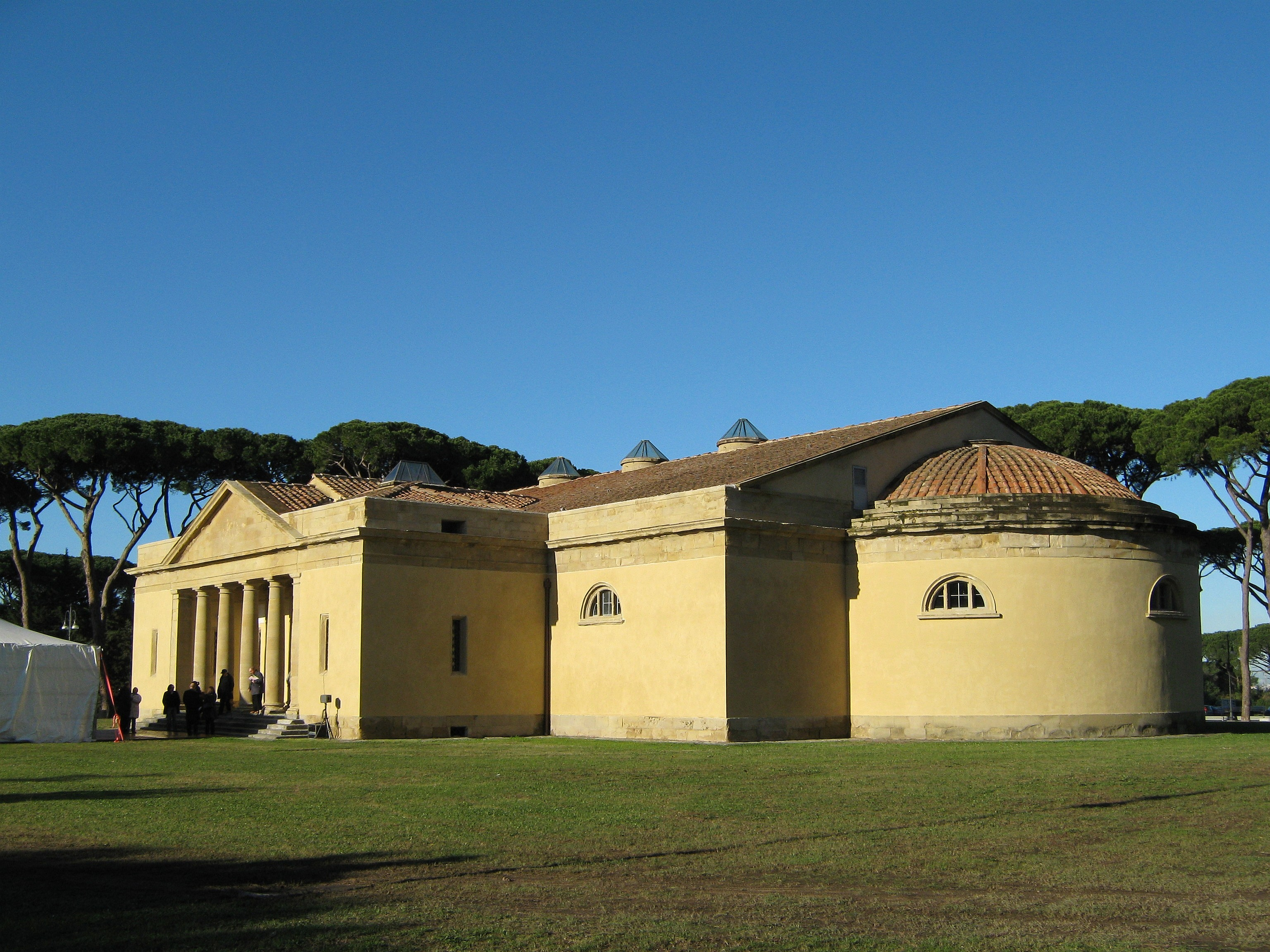 Livorno: il Cisternino di Pian di Rota (XIX secolo), progettato da Pasquale Poccianti. Nella foto, la struttura nelle ore che hanno preceduto l'inaugurazione dopo il restauro conclusosi il giorno 7 dicembre 2008.